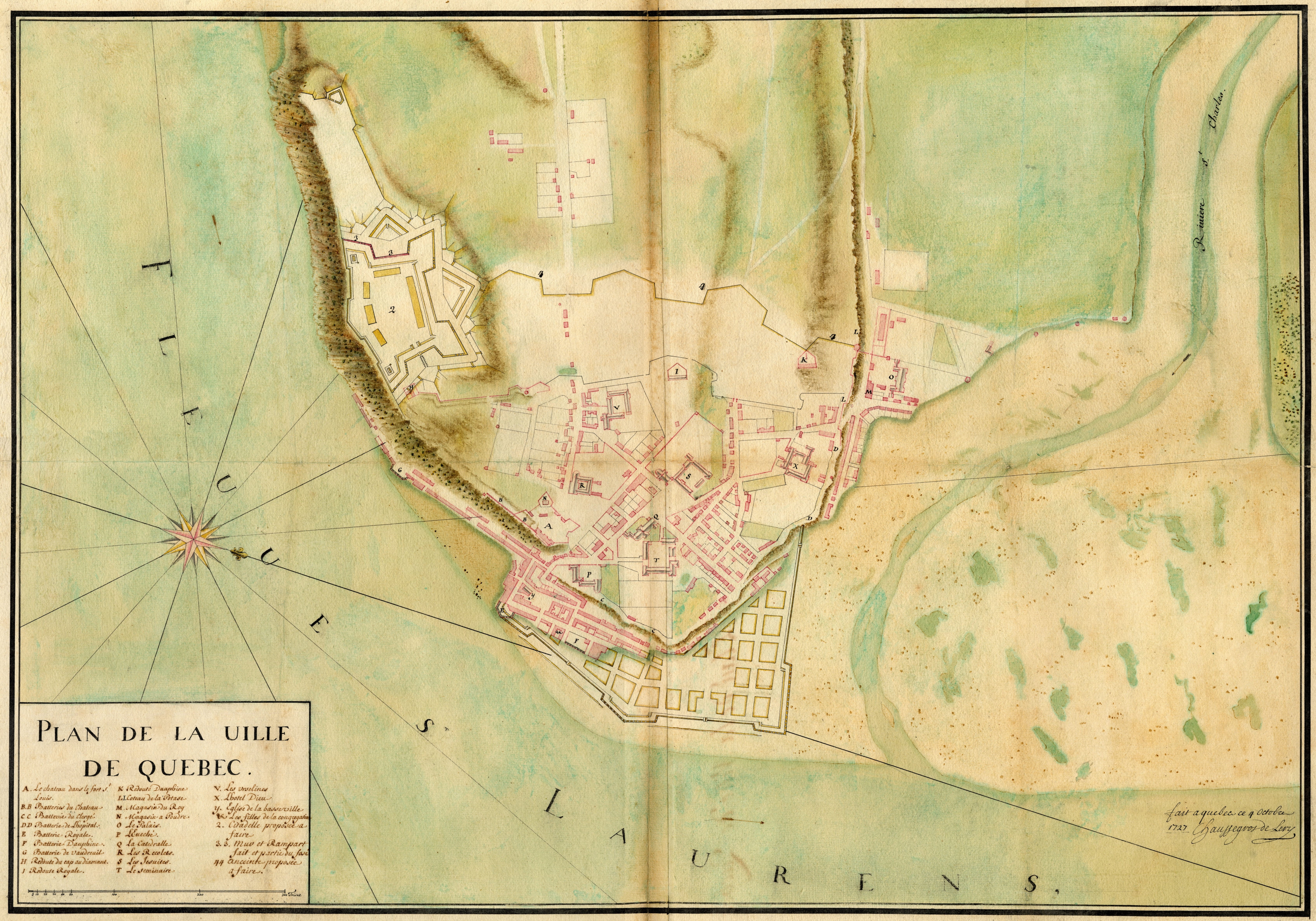 Plan de la ville de Quebec